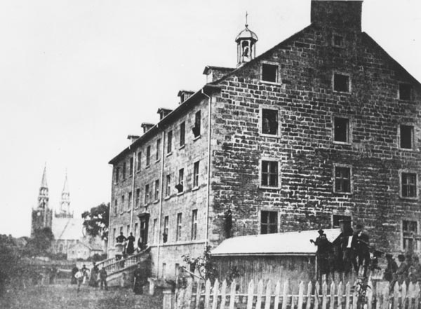 Le Collège Saint-Laurent vers 1860 appartenant aux Pères de Sainte-Croix. Futur site du musée.